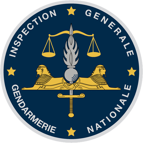 Insigne de l'Inspection générale de la Gendarmerie nationale (IGGN)